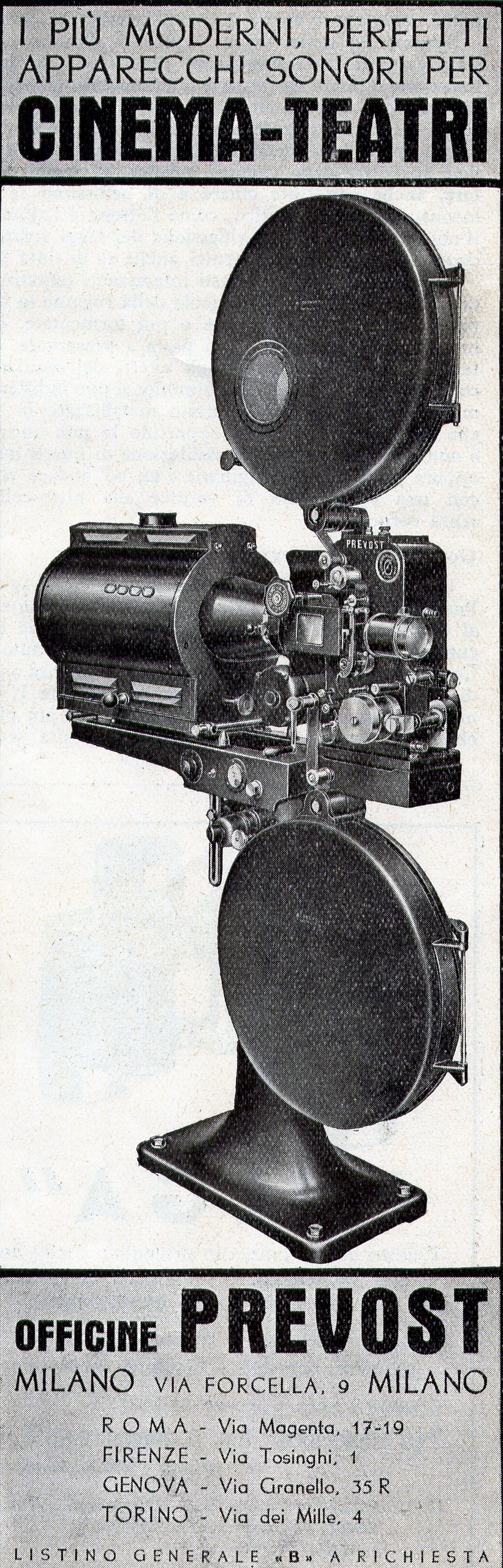 Proiettore cinematografico per pellicole da 35mm delle Officine Prevost prodotto negli anni Trenta nello stabilimento di via Forcella 9, Milano - Immagine pubblicitaria presumibilmente del 1937